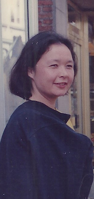 Pia Arke